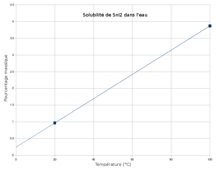 Solubilité de SnI2 dans l'eau en fonction de la température.